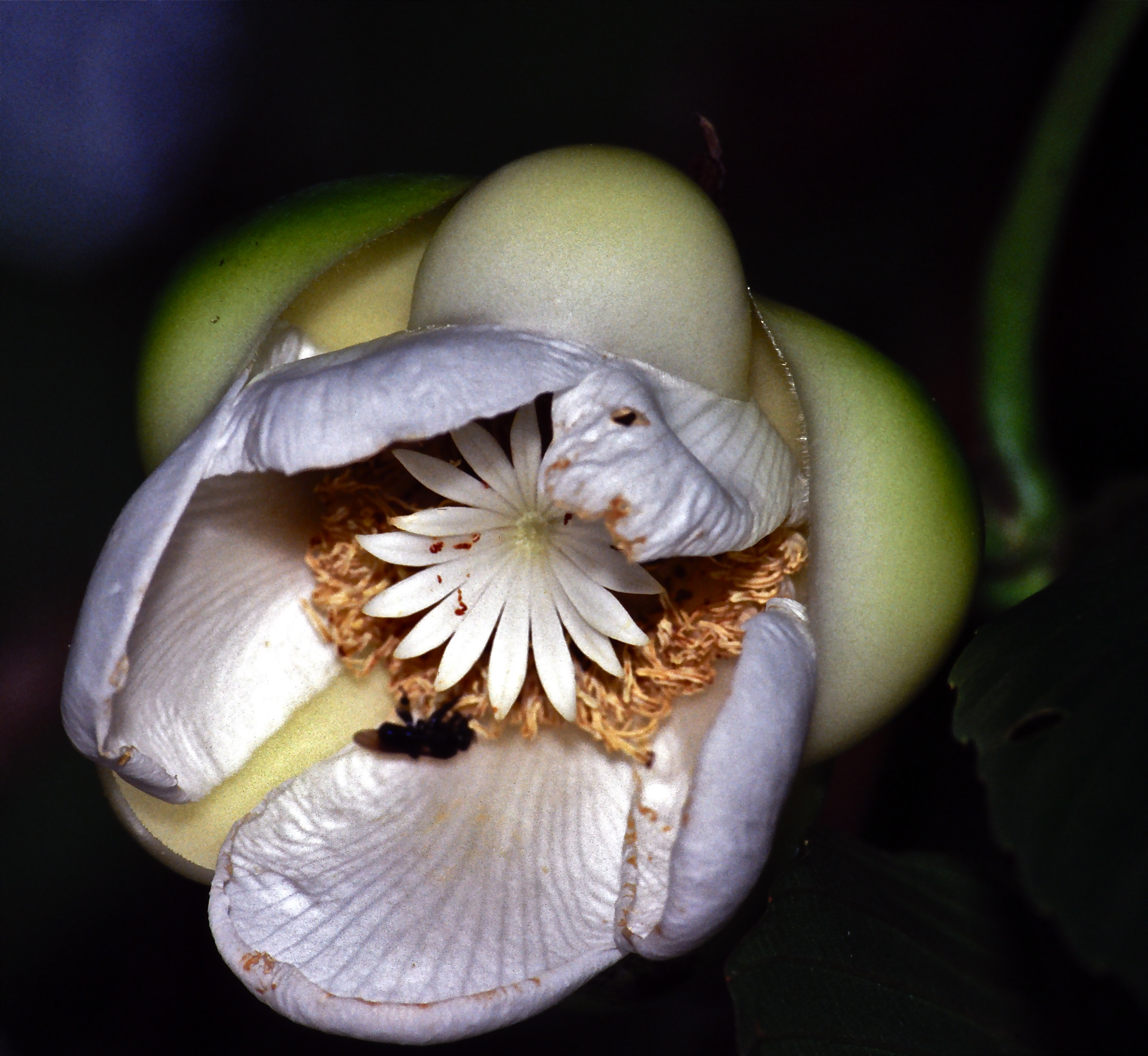 Gunung Leuser NP, Sumatra, INDONESIA